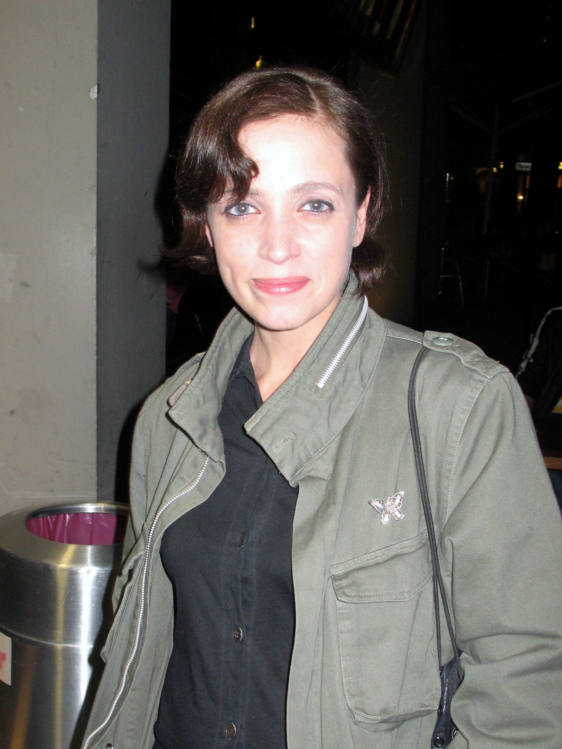 Anna Thalbach bei der Filmpremiere von Esperanza, Berlin, 26. Mai 2008